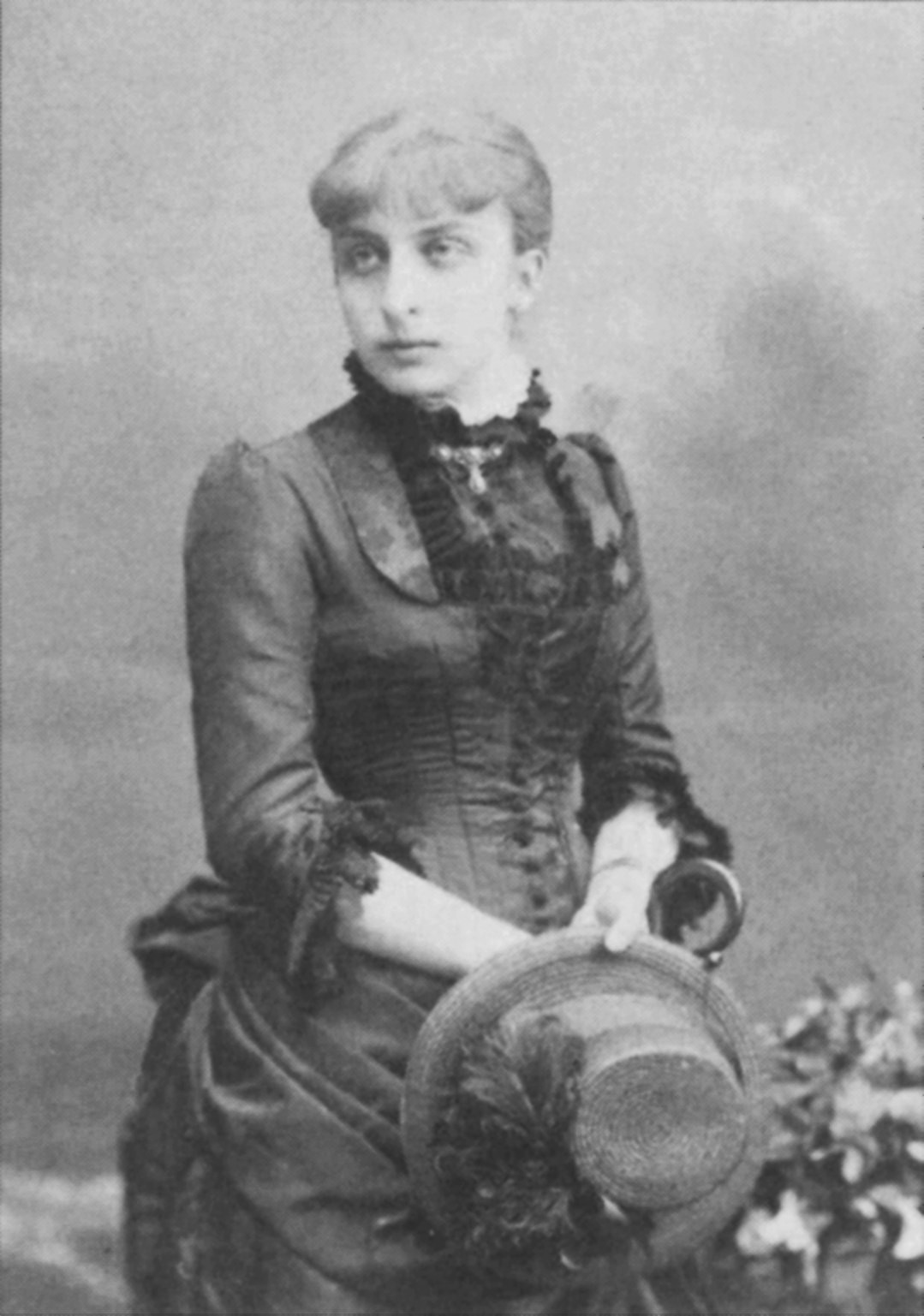 Jadwiga Woyniłłowicz (później - Kostrowicka), siostra Edwarda Woyniłłowicza